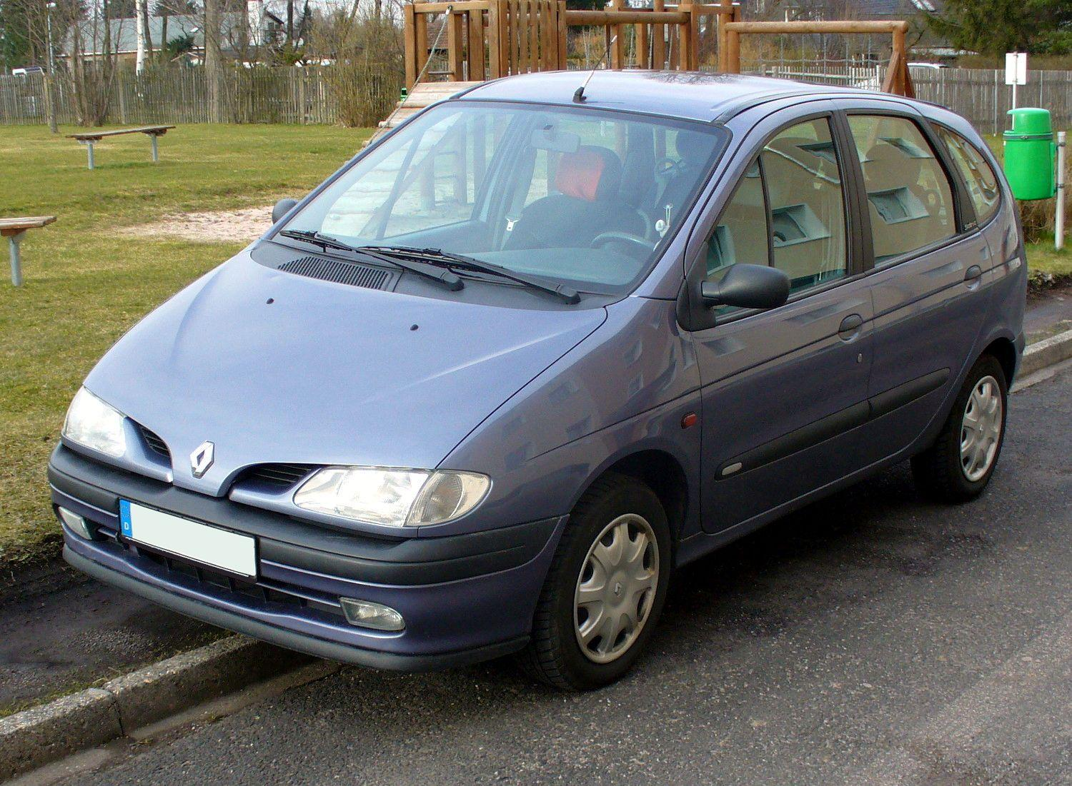 Renault Mégane Scénic I